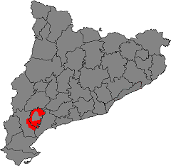 Àrea de la Denominació d'Origen Montsant